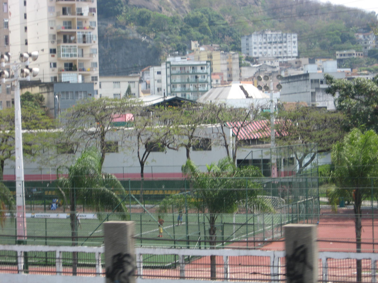 Vila Olímpica da Mangueira, localizada no Rio de Janeiro.